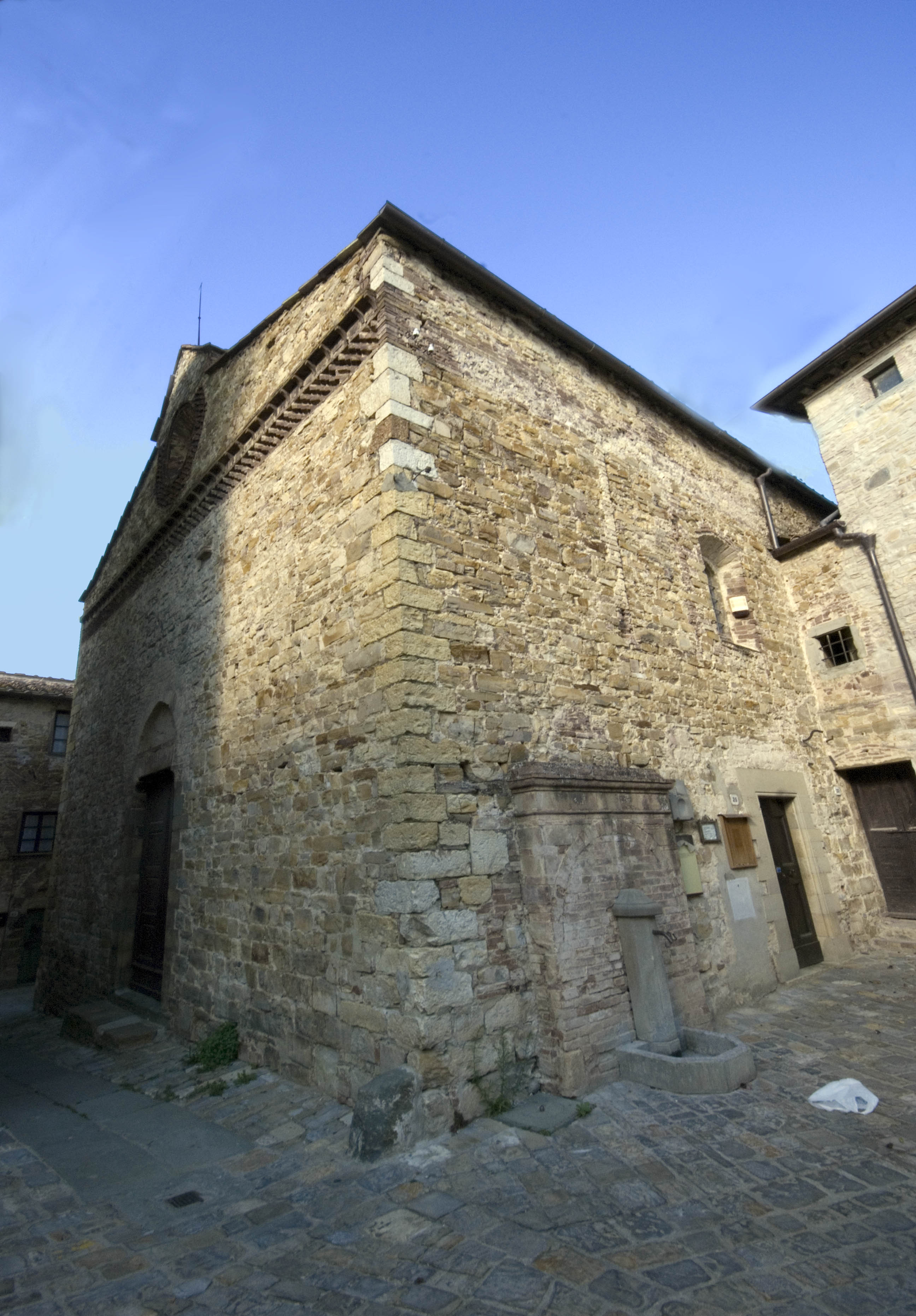 oratorio di san donato in poggio(FI)